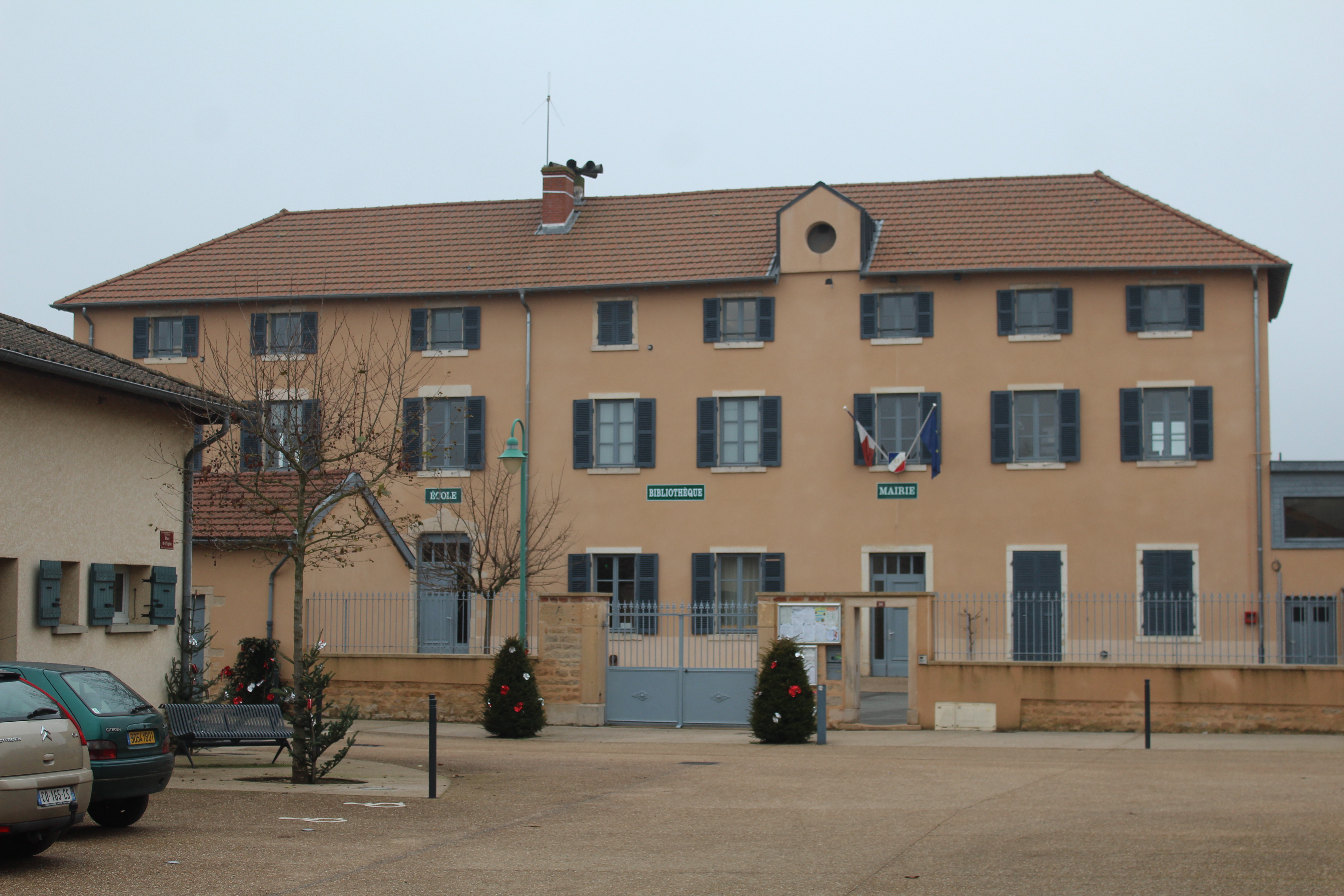 Mairie de Garnerans.